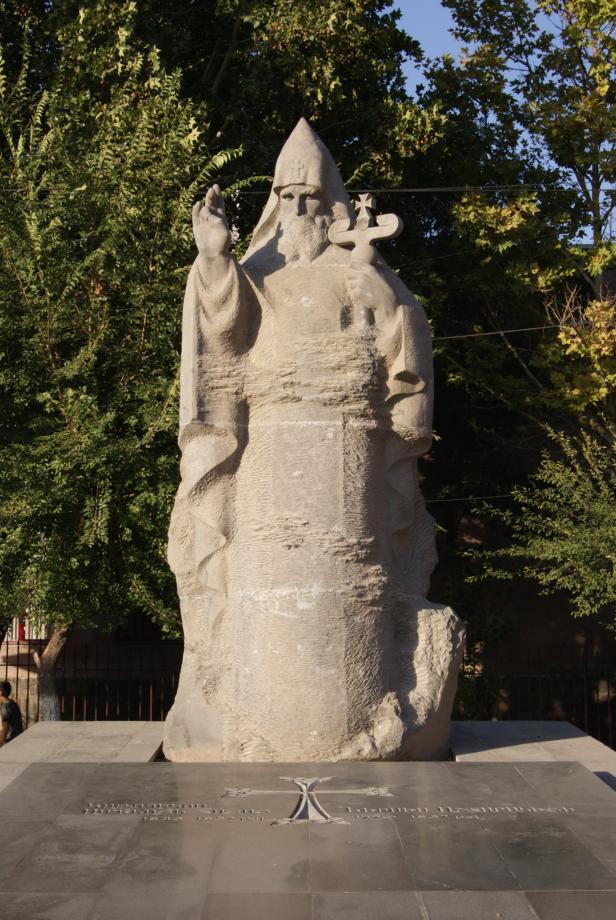 Գտնվում է Աշտարակի Ներսես Աշտարակեցի հրապարակում 1/26